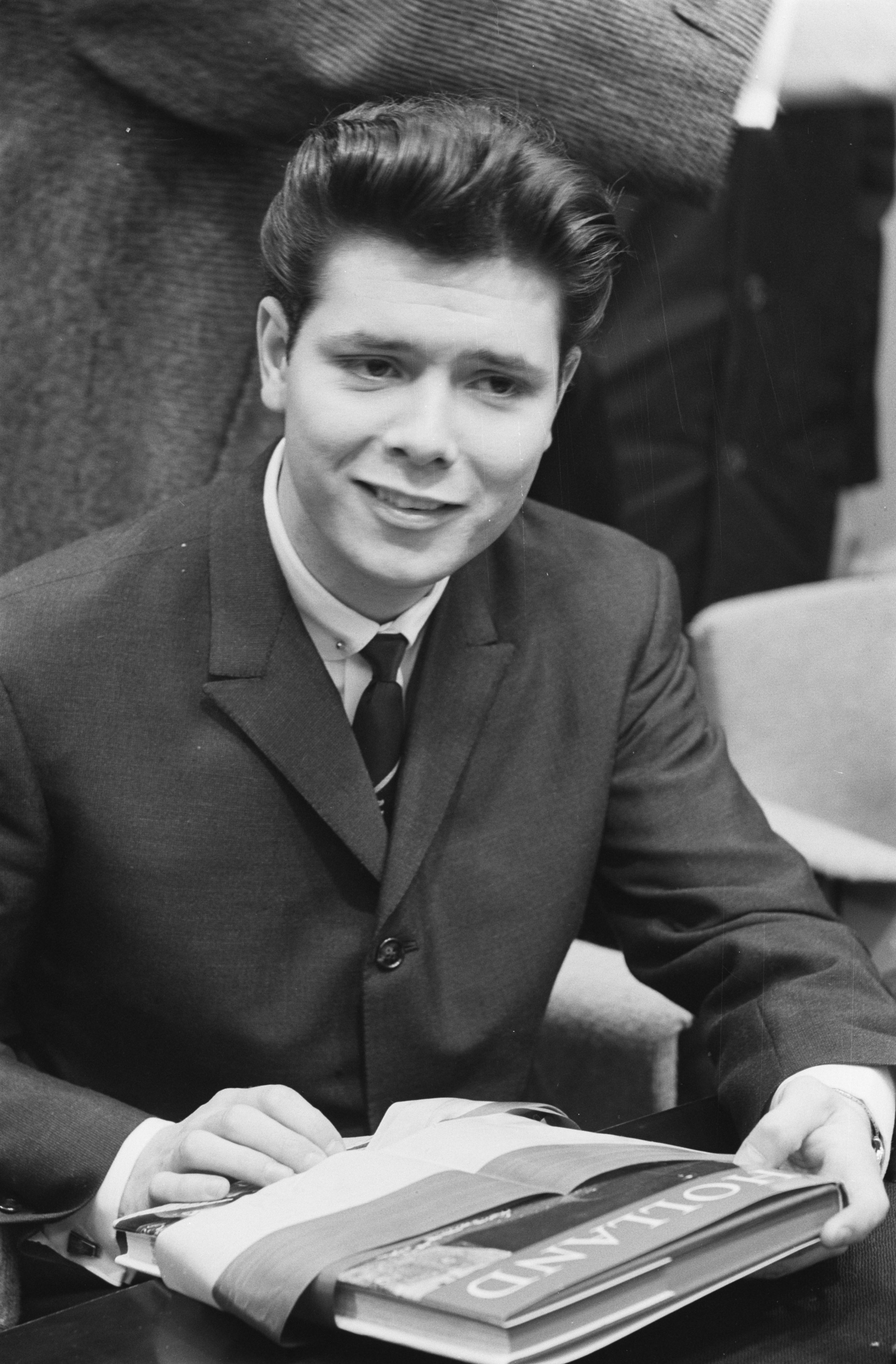 Collectie / Archief : Fotocollectie Anefo Reportage / Serie : [ onbekend ] Beschrijving : Cliff Richard persconferentie op Schiphol Datum : 6 april 1962 Locatie : Noord-Holland, Schiphol Trefwoorden : artiesten, persconferenties, portretten, zangers Persoonsnaam : Richard, Cliff Fotograaf : Pot, Harry / Anefo Auteursrechthebbende : Nationaal Archief Materiaalsoort : Negatief (zwart/wit) Nummer archiefinventaris : bekijk toegang 2.24.01.05 Bestanddeelnummer : 913-7393